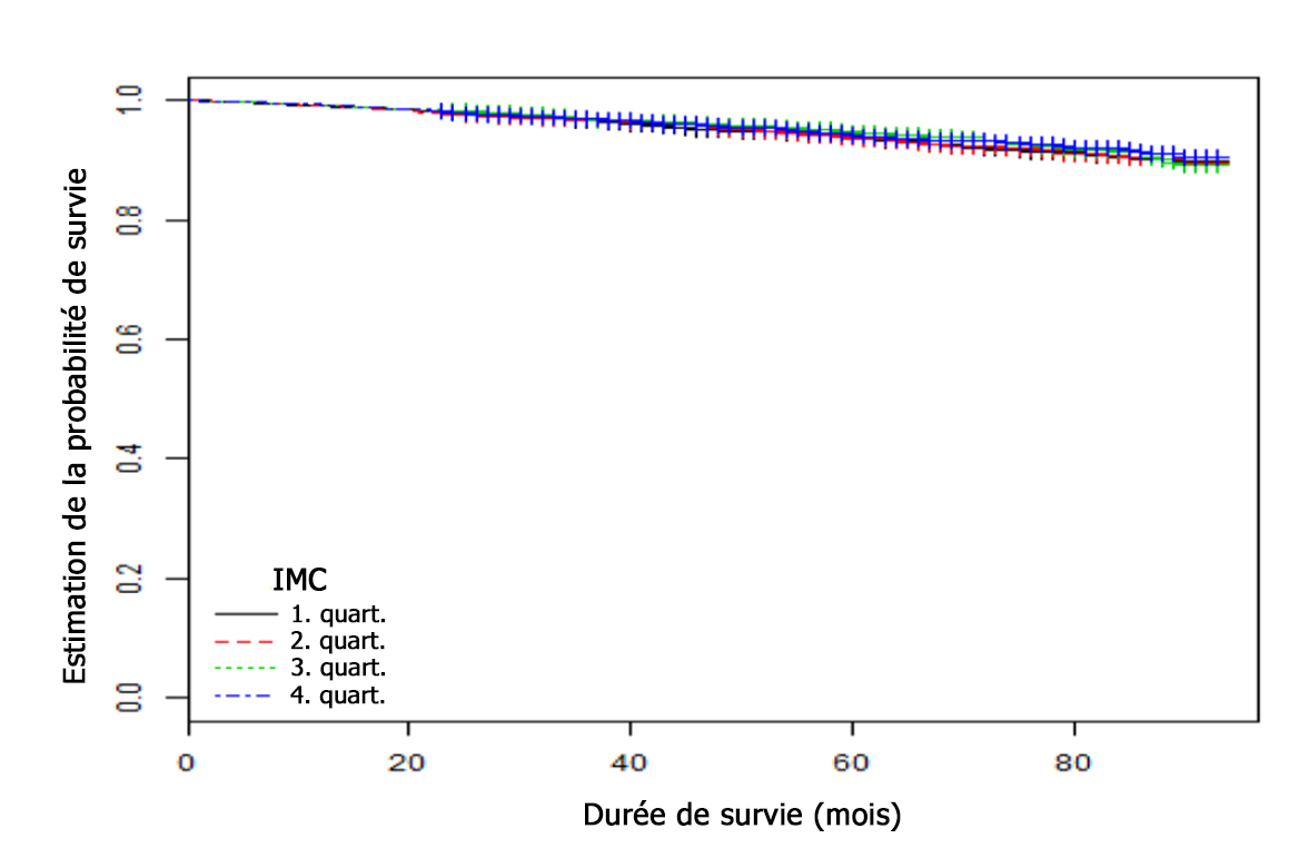 Statistique de Kaplan-Meier de la probabilité de survie déterminée sur une cohorte test pour les quatre inter-quartiles de l'IMC.